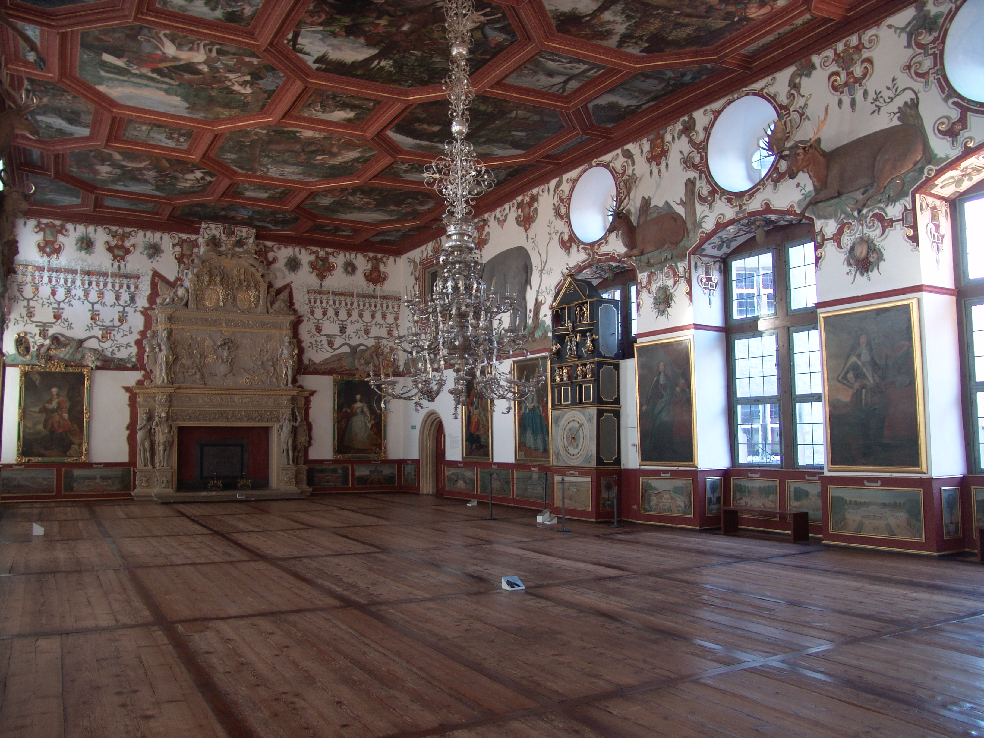 Weikersheim, Schloss, Rittersaal (Kamin von Michael Juncker d.Ä.)